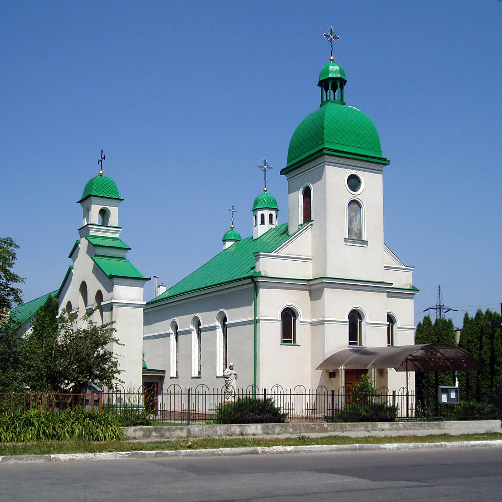 Церква Різдва Івана Хрестителя у Винниках під Львовом.